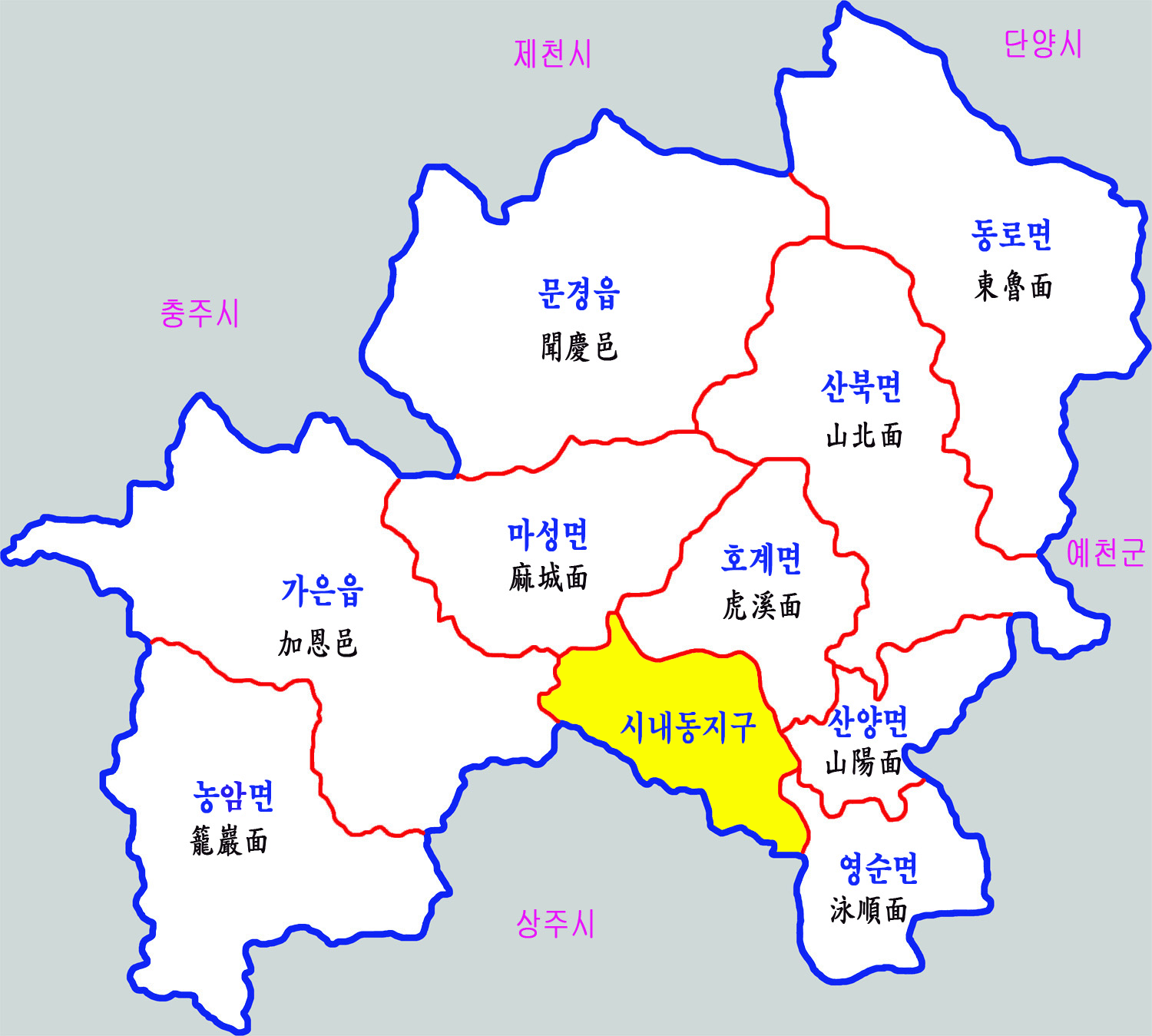 문경시 행정구역